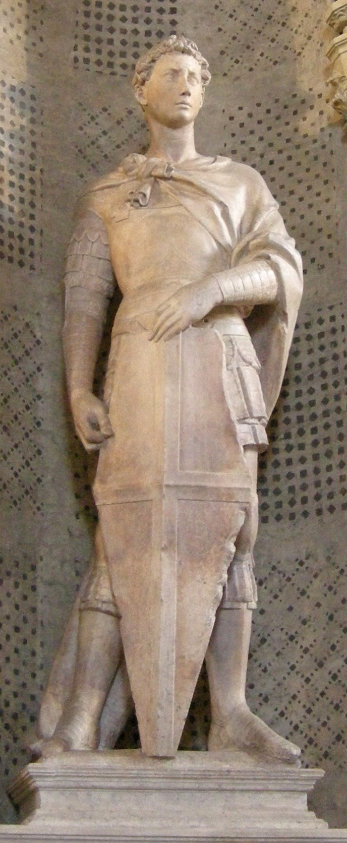 Donatello, san giorgio 01.2